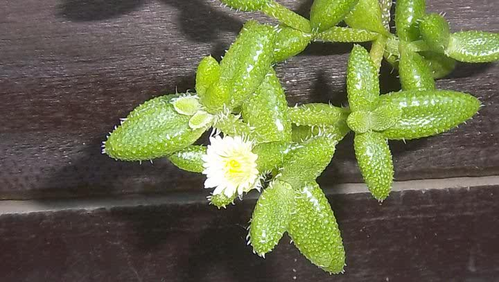 Es la planta Delosperma echinatum comunmente llamda cactus pepinos con sus flores que son de color amarillo y blanco